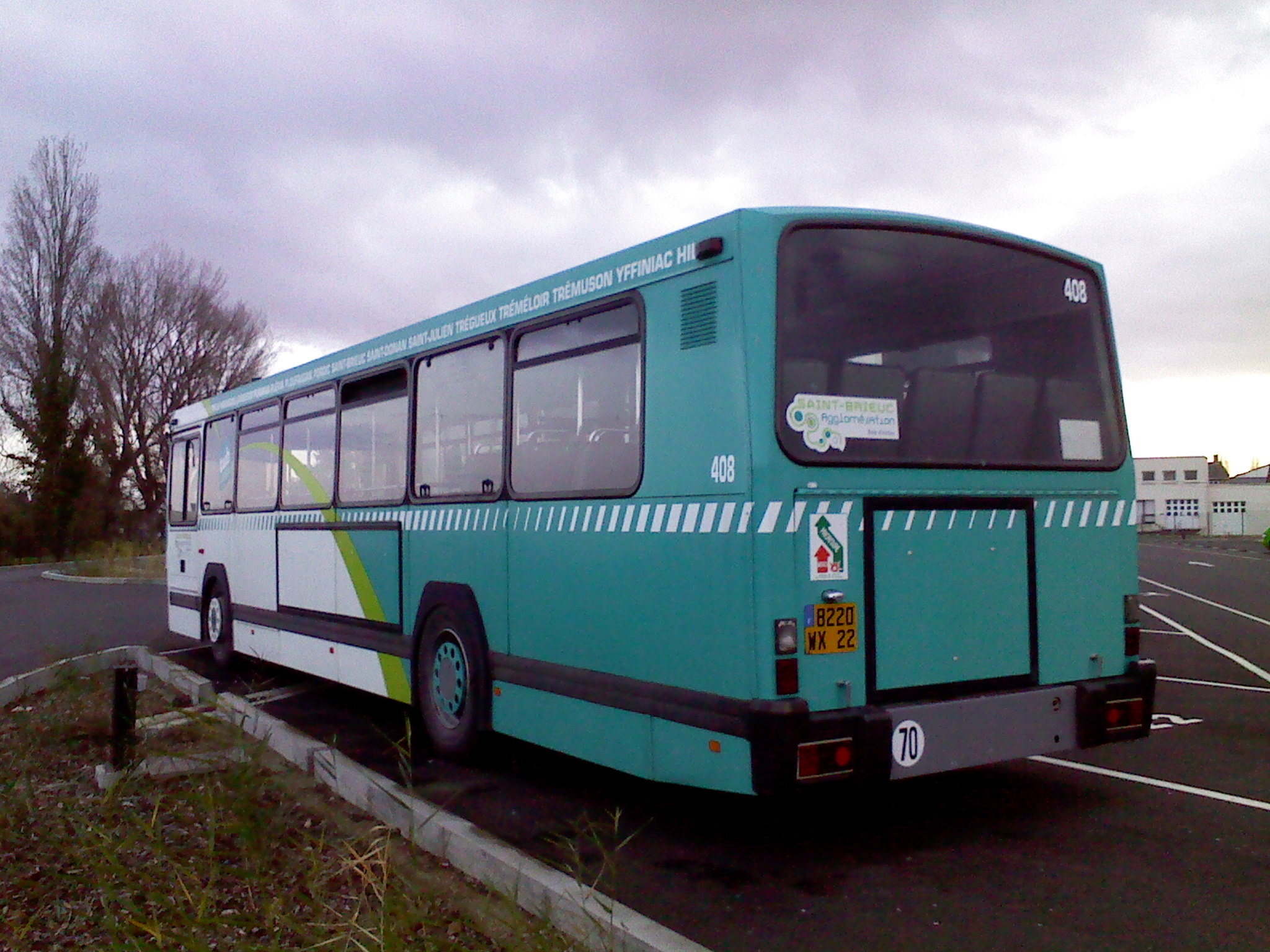 Renault PR 112 des TUB (Saint-Brieuc)